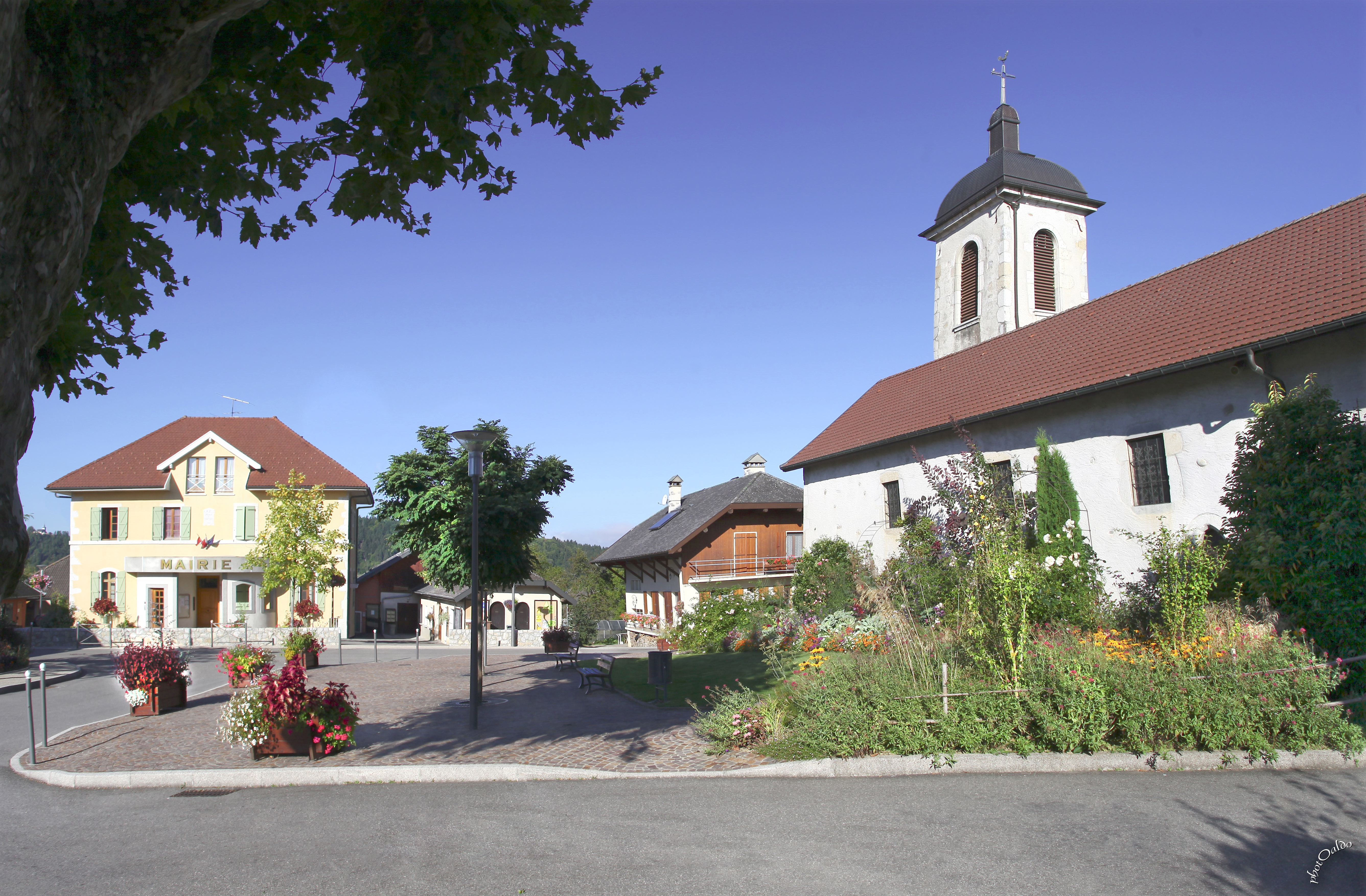 Centre du village de Chapeiry